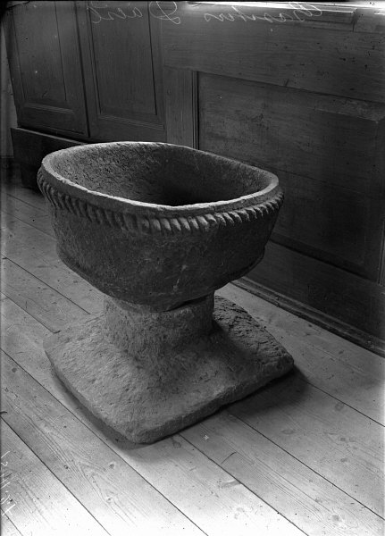 Dopfunt av täljsten, snabbinv. Kategori: (04) Dopfuntar Dopfunt av täljsten, snabbinv.